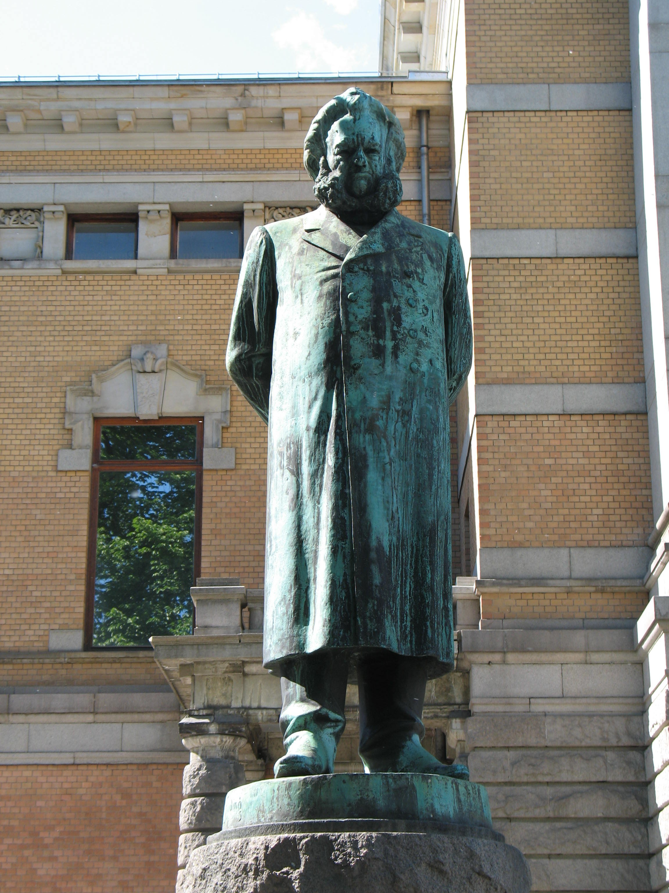 Statue av Henrik Ibsen utenfor Nationaltheatret i Oslo